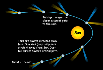 Comet Diagram